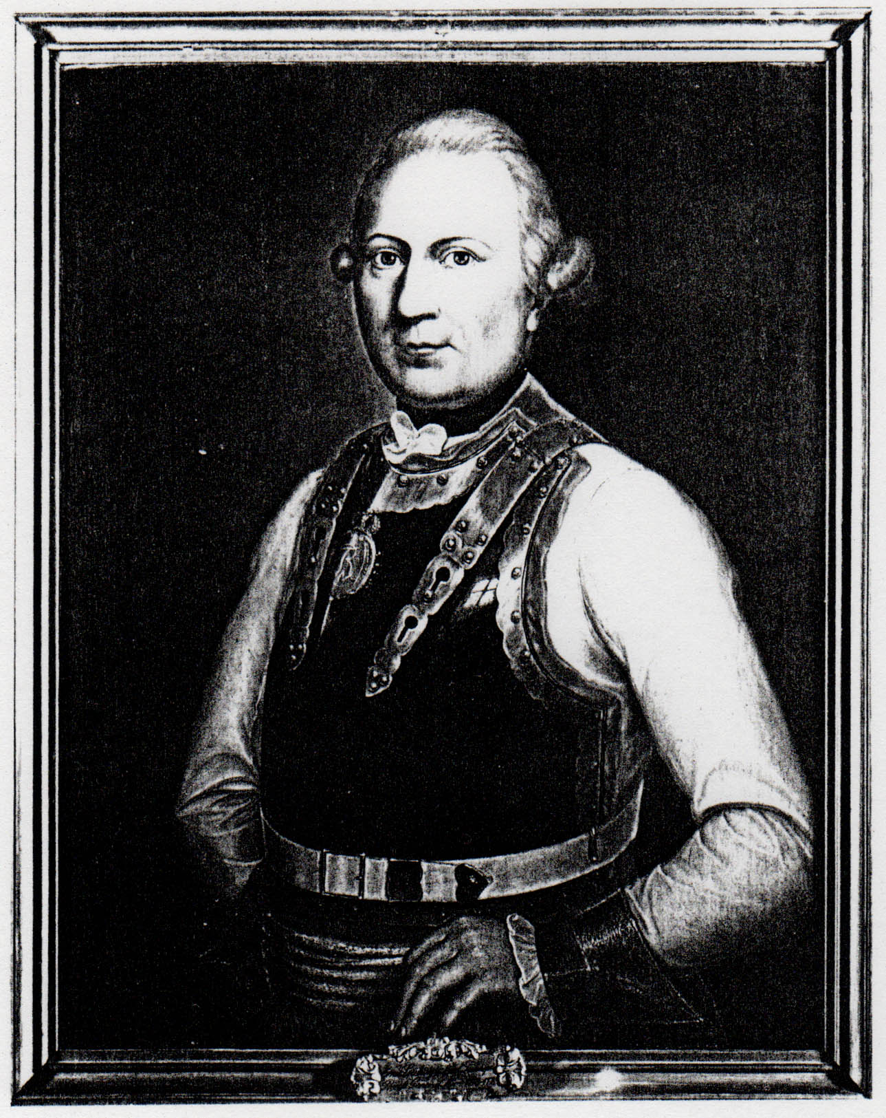 Ernst Ludwig von Pfuel (* 20. April 1718 in Gielsdorf; † 23. Juli 1789 in Berlin) war ein königlich-preußischer Generalmajor, vormals Hofmarschall des Prinzen Friedrich Wilhelm von Preußen und Gutsherr auf Jahnsfelde.